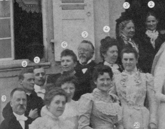 Hochzeit von Bertha Loës (Nichte von Max Loës) und Emil Hoch, 24. April 1900, Foto der Hochzeitsgesellschaft (Ausschnitt). Legende: 5. Max Loës, 6. seine Frau Thekla geb. Kreuzer, 7. Karl Loës, ihr Sohn.